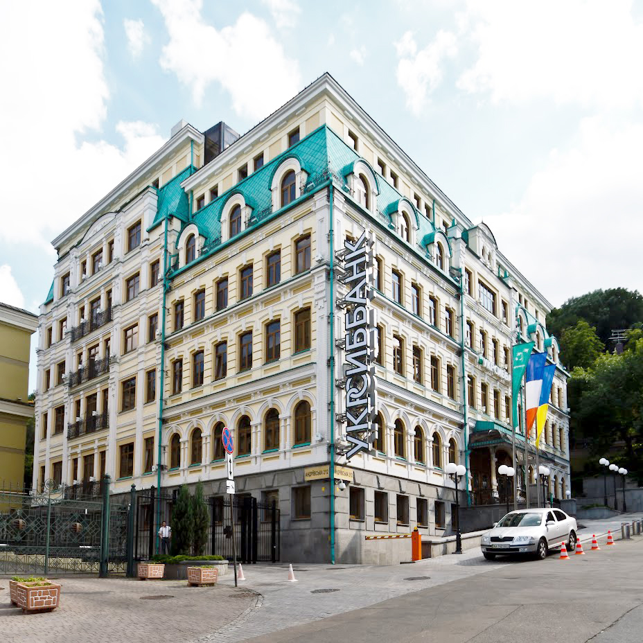 Офіс УКРСИББАНКА на вул. Андріївській, 2/12